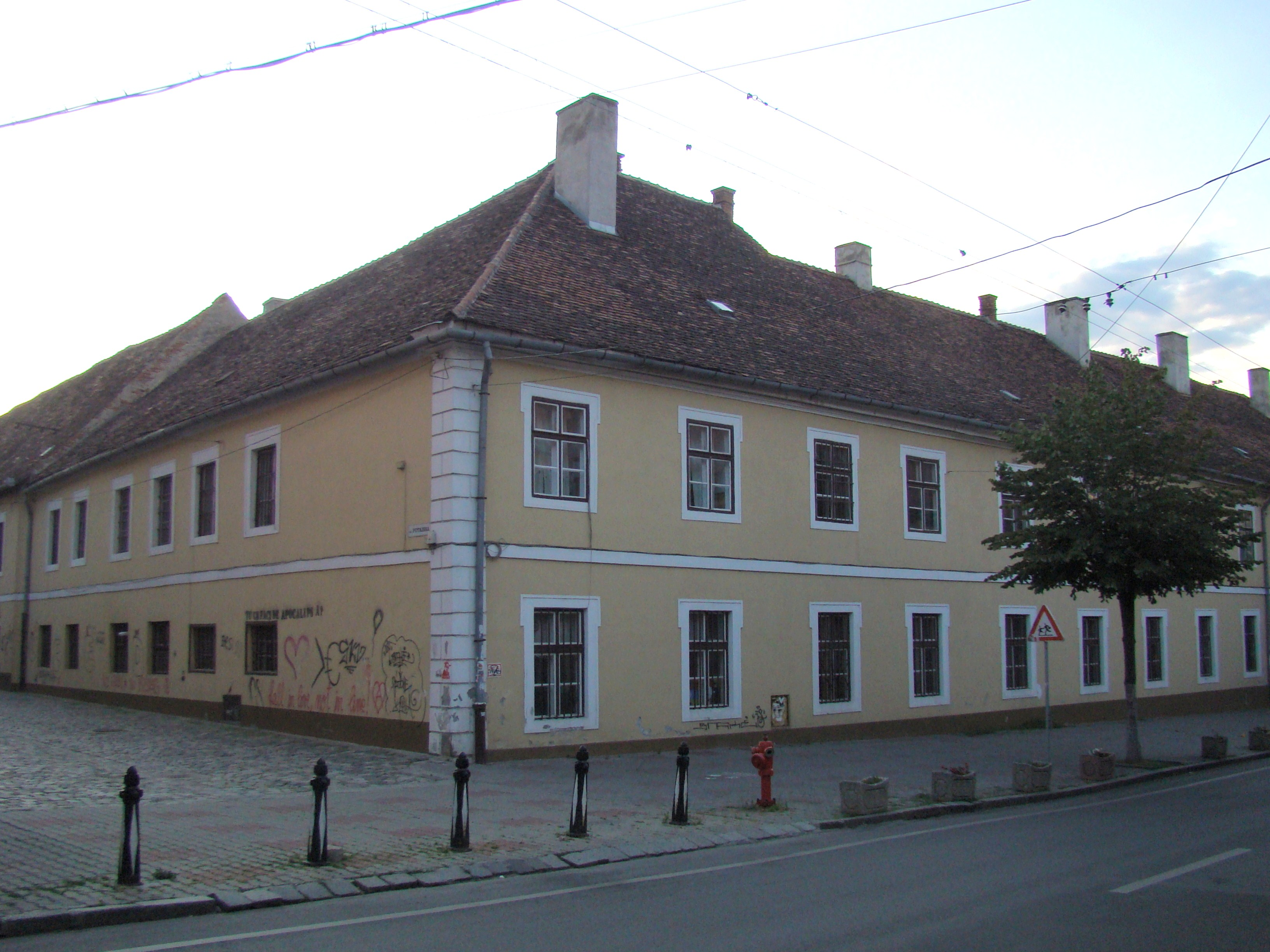 Casa Báthory-Apor din Cluj-Napoca